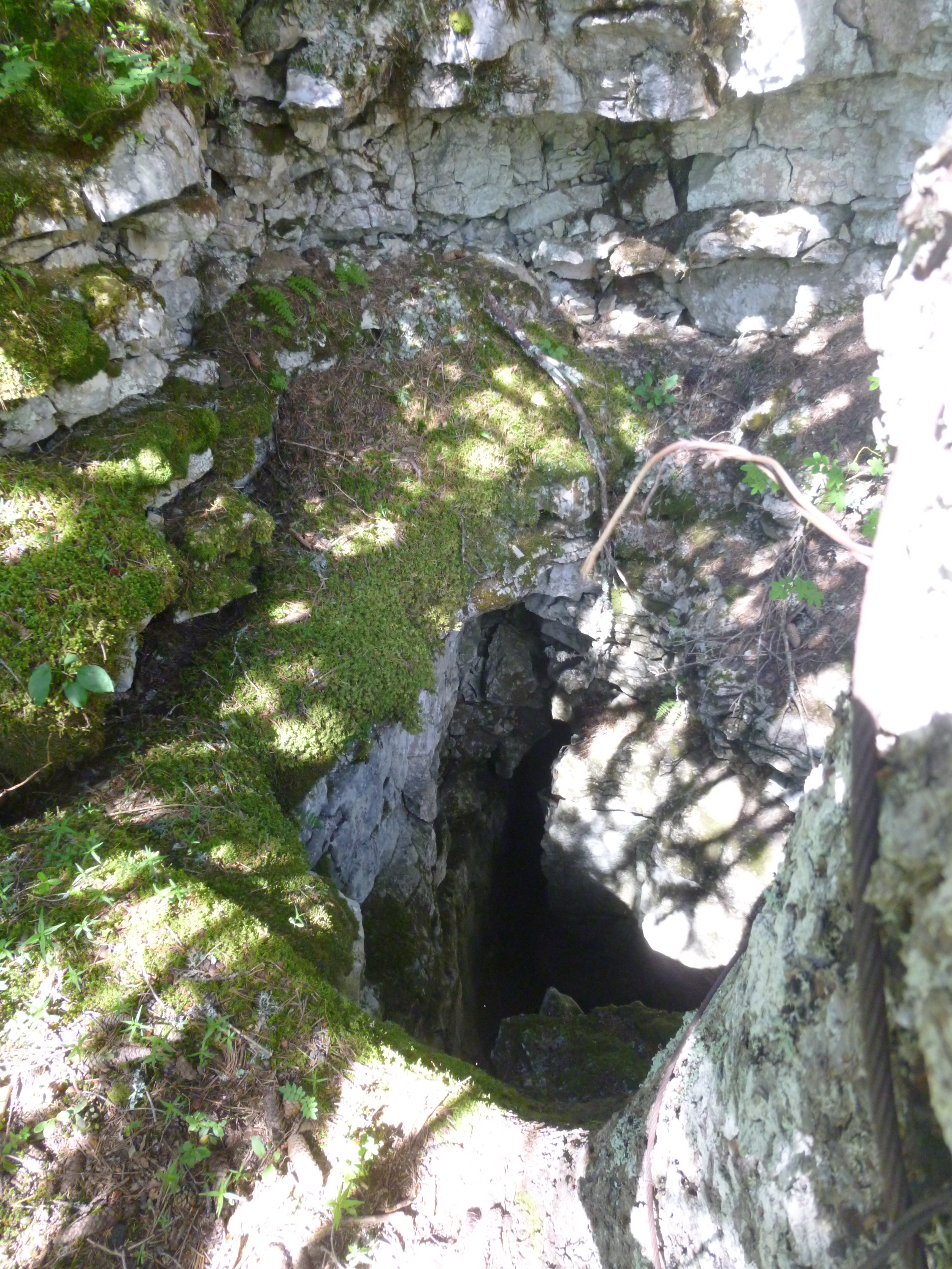 puits d'entrée du gouffre Pot 2 situé sur les hauts plateaux du Vercors.